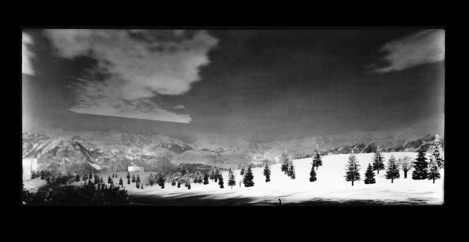 Tomáš Pospěch´s photography